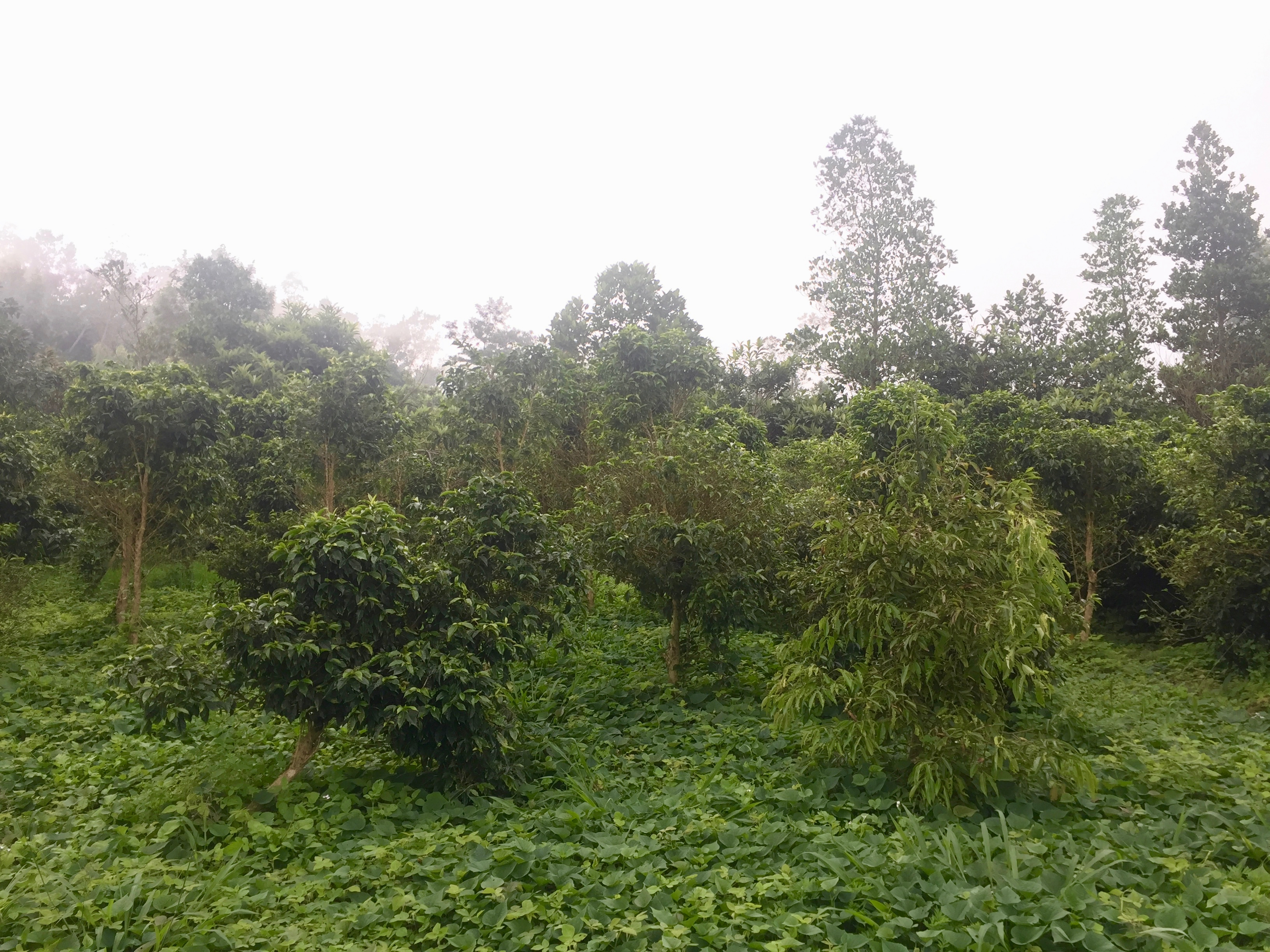 Caféiers de la ferme Sliti, Saint Paul, Reunion